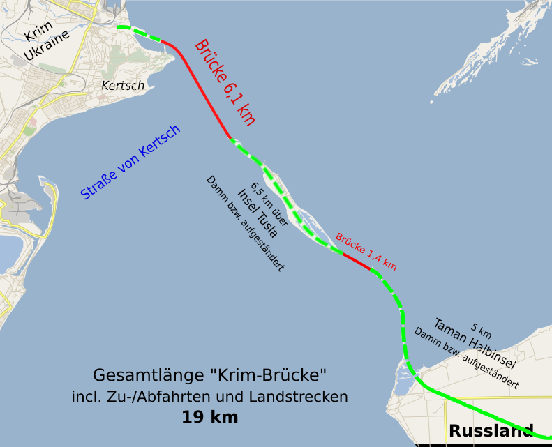 Darstellung der Überwasser-Brücken und der zu-/Abfahrten bzw Landteile